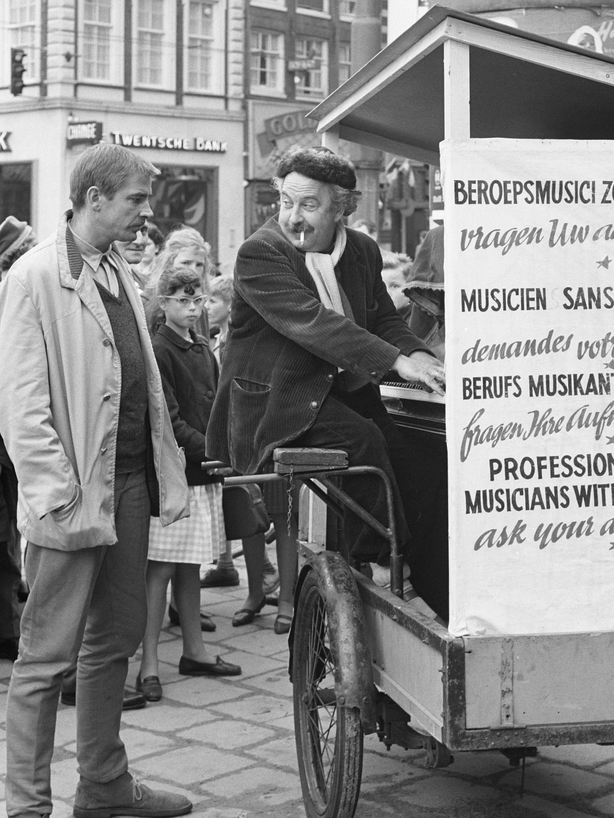 Nederlandse film 'Fietsen naar de maan'. Links Ton Lensink (als Evert Egmond), rechts Lex Goudsmit als pianist 9 mei 1962